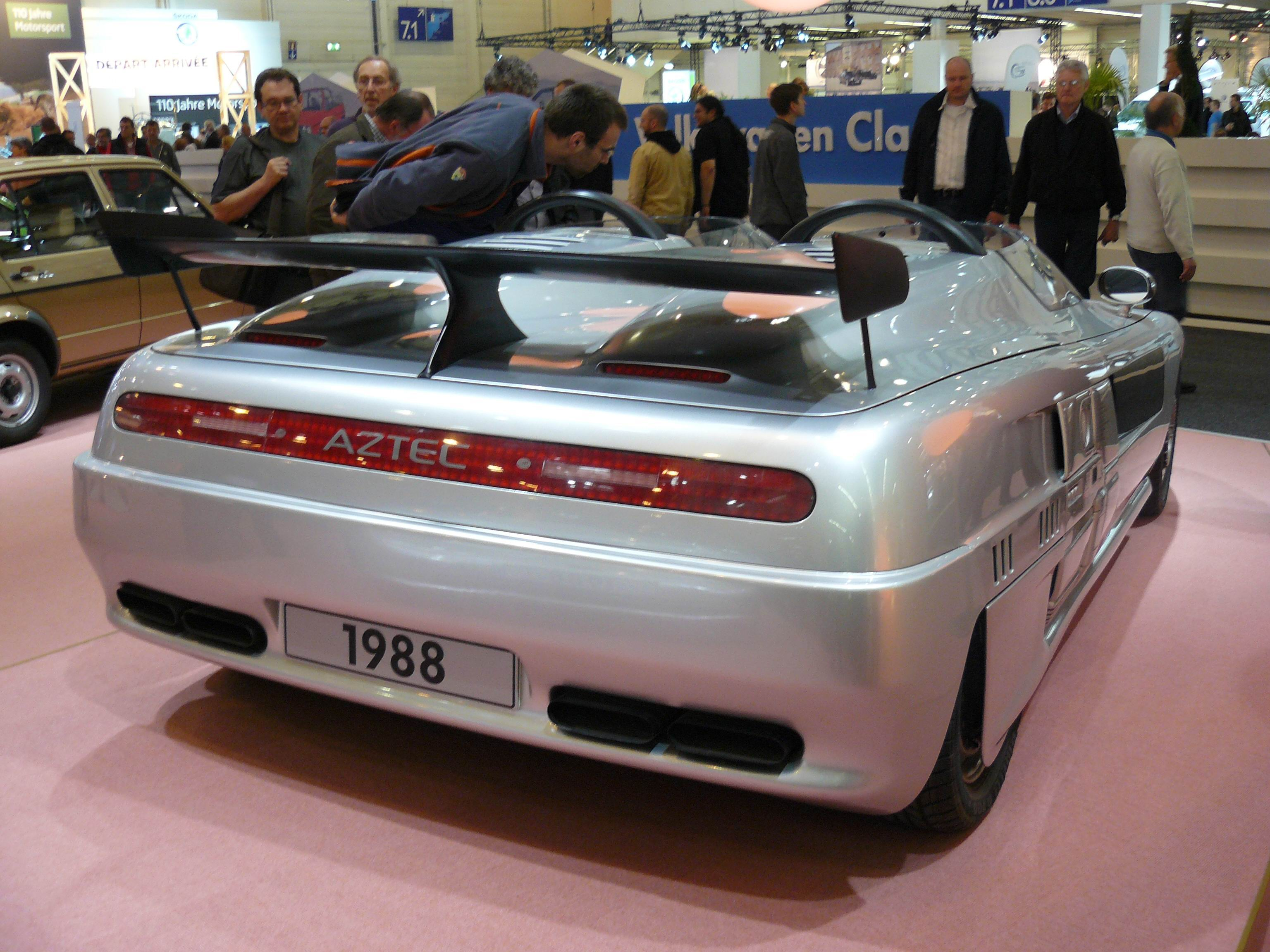 Essen 2011